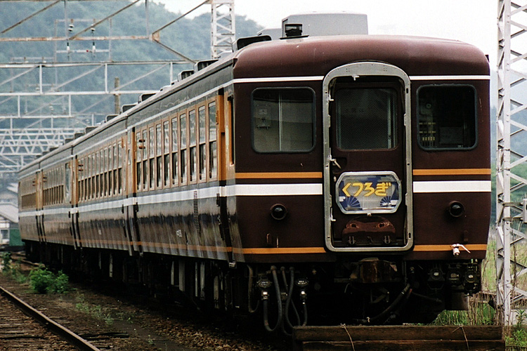 PC12 passenger car based resort train "Kutsurogi". 12系改造お座敷客車｢くつろぎ｣。写真は引退後横川駅構内に留置されていたころのもの。